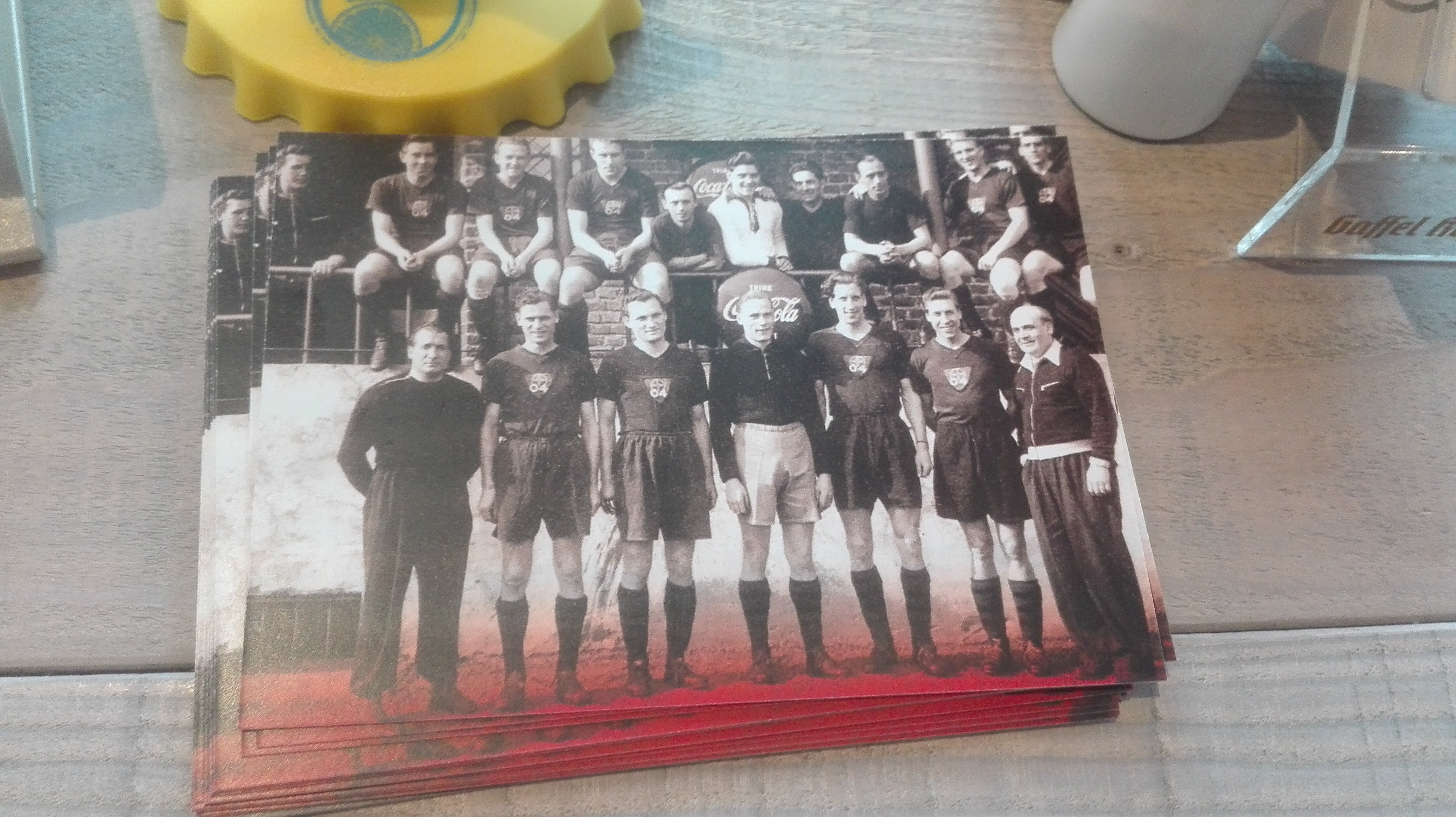 Foto einer Postkarte der Leverkusener Oberliga-Aufstieger von 1951